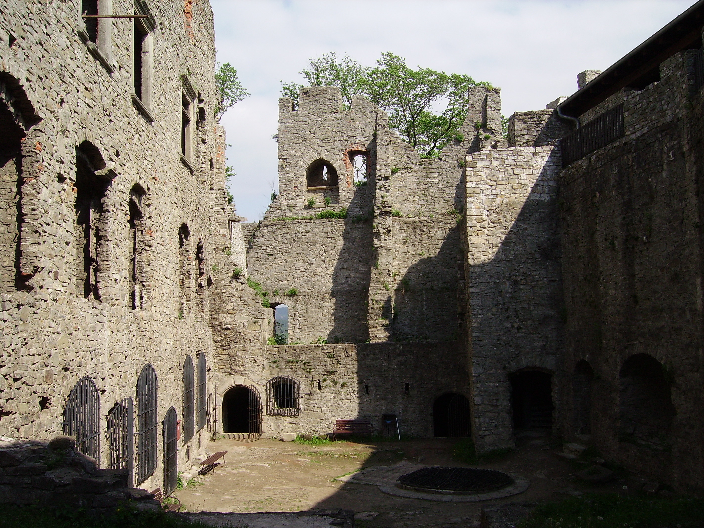 Hukvaldy_Castle19.JPG